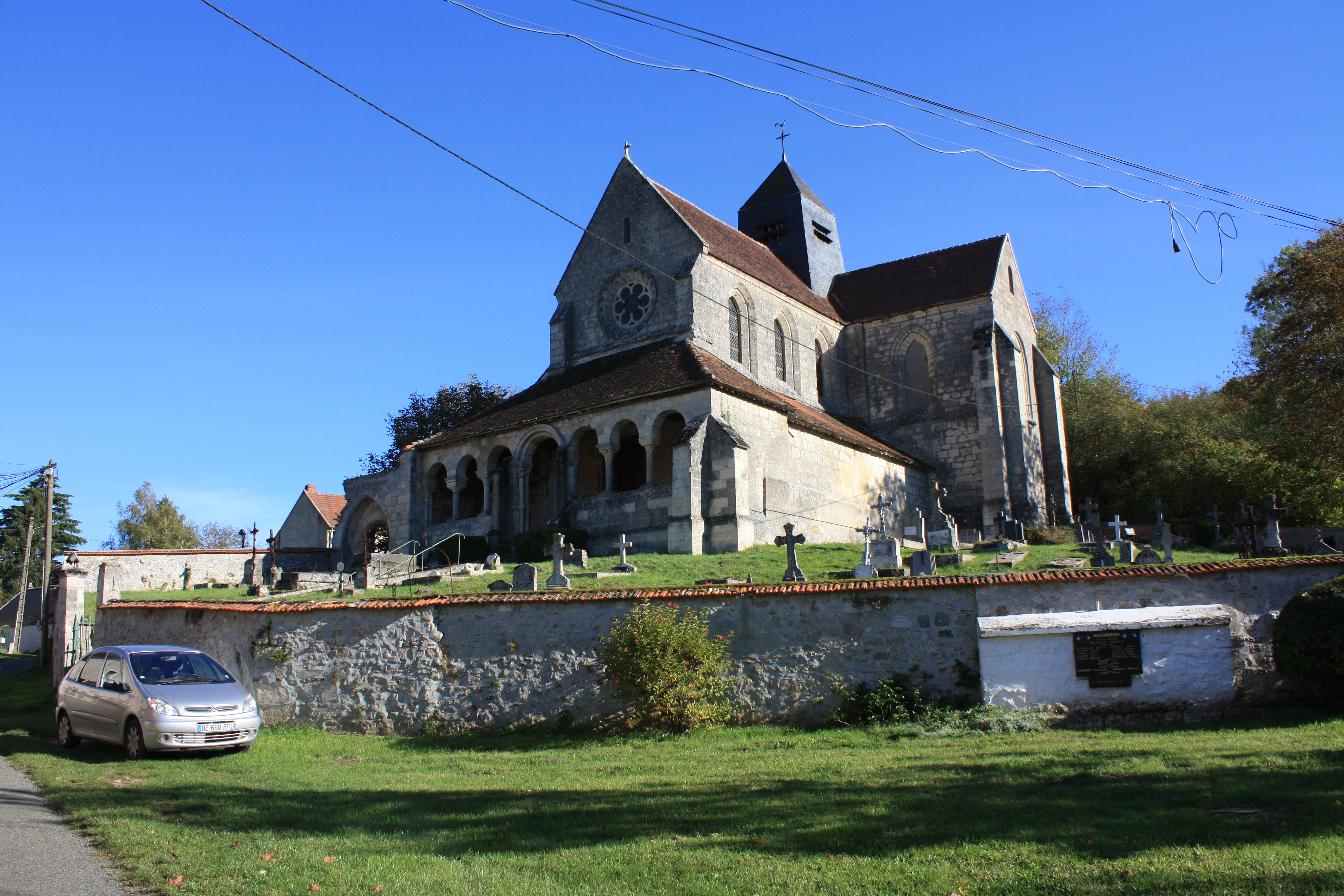 Église Saint-Germain de Mareuil-en-Dôle